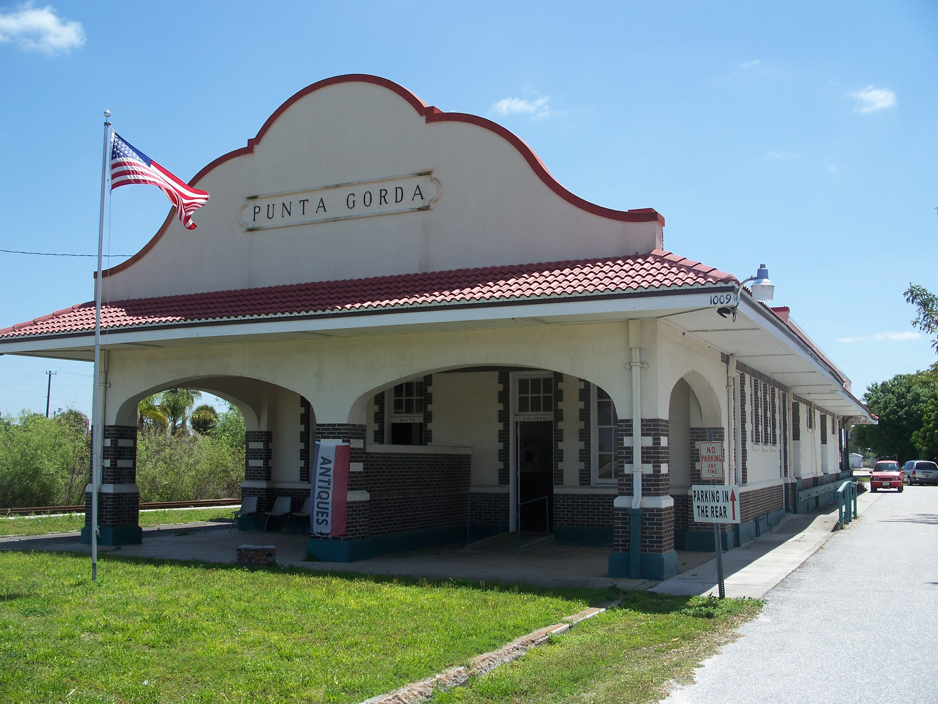 Punta Gorda, Florida: Punta Gorda Atlantic Coast Line Depot